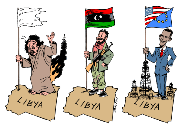 O futuro da Líbia de mastro em mastro.